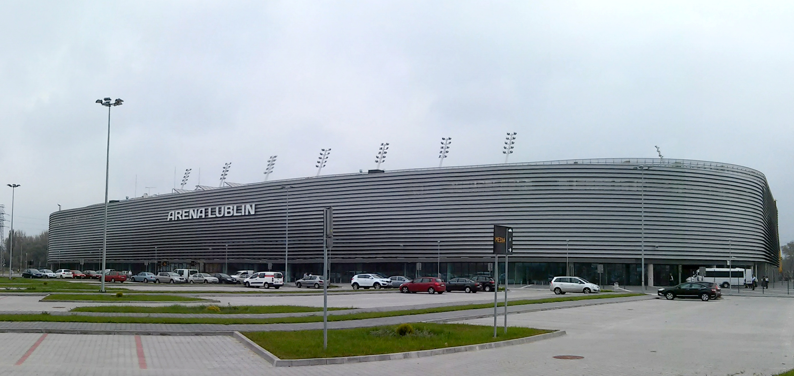 Arena Lublin podczas XI Lubelskiego Festiwalu Nauki.